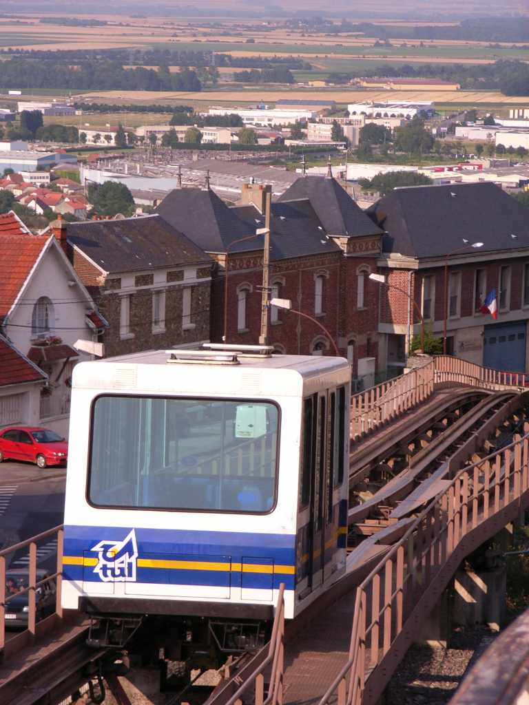 metro Poma, Laon